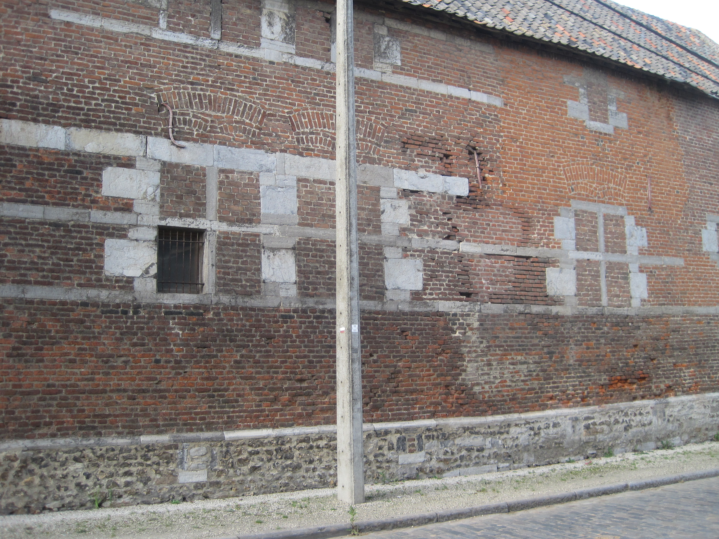 Ferme de la Grosse Tour